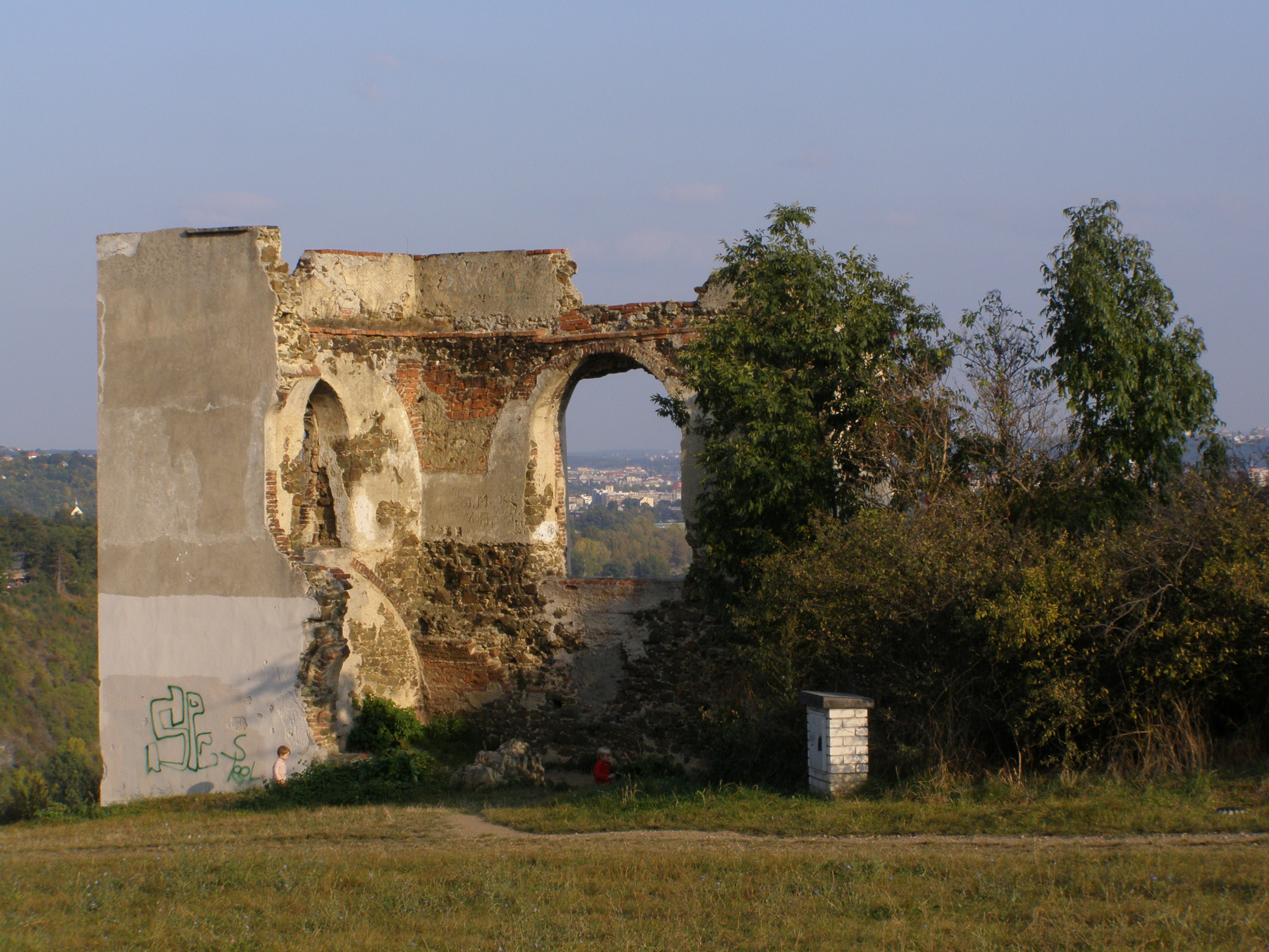 Praha, PP Baba